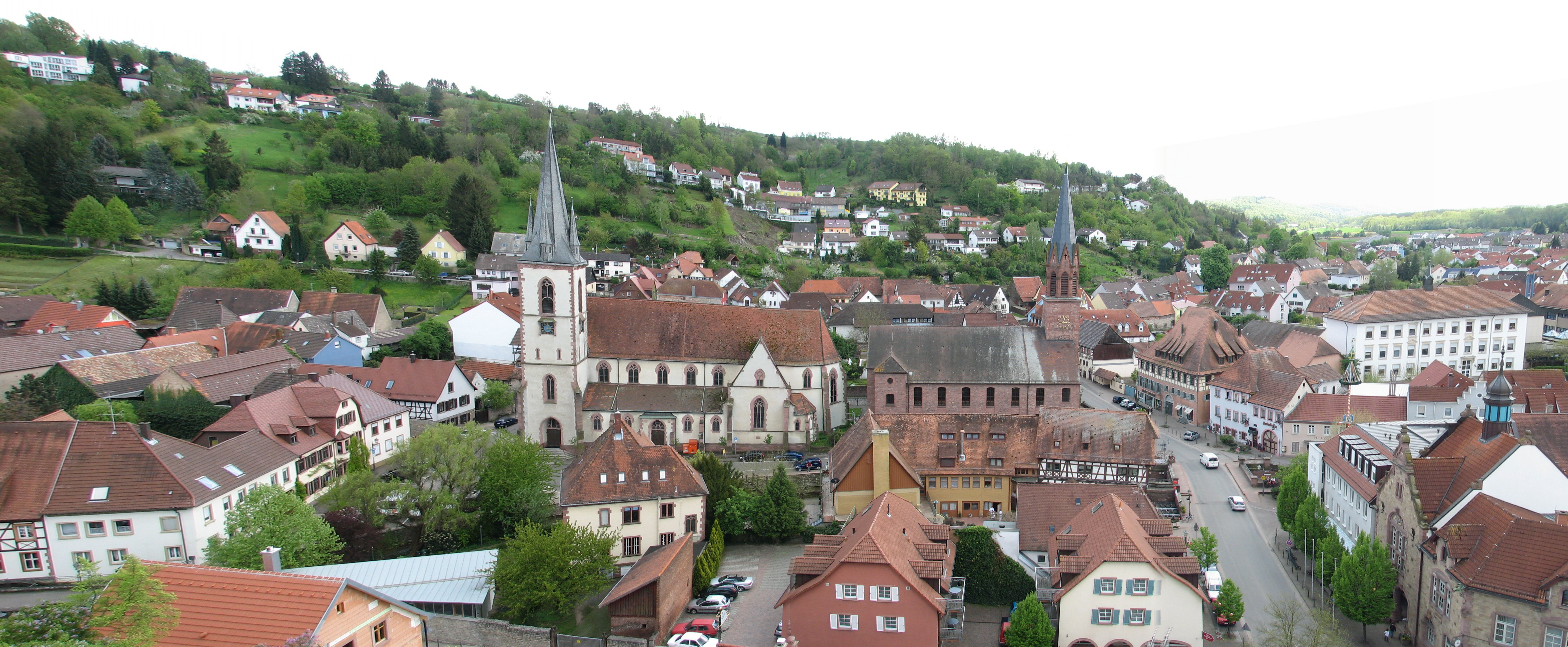 Ein Teil des Zentrums von Weingarten (Baden)